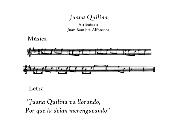 Fragmento de la Juana Aquilina